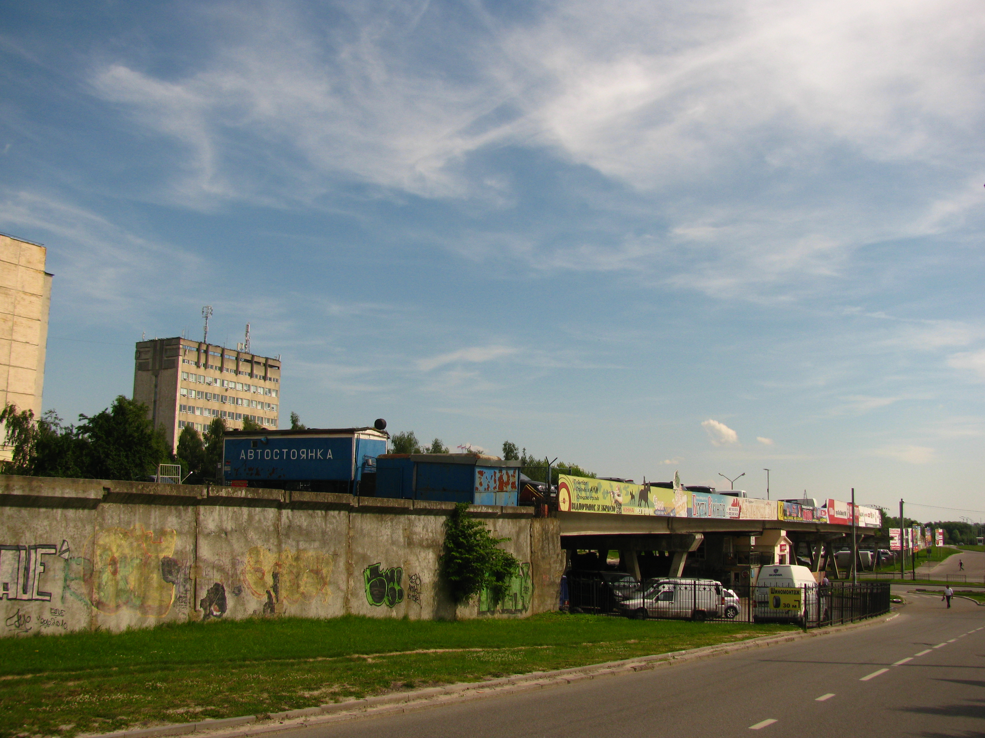 Недобудований трамвайний шляхопровід на вулиці Княгині Ольги у Львові над її розв*язкою з вулицею Науковою. Збудований у 1980-х роках в рамках будівництва в місті швидкісного частково підземного трамвая